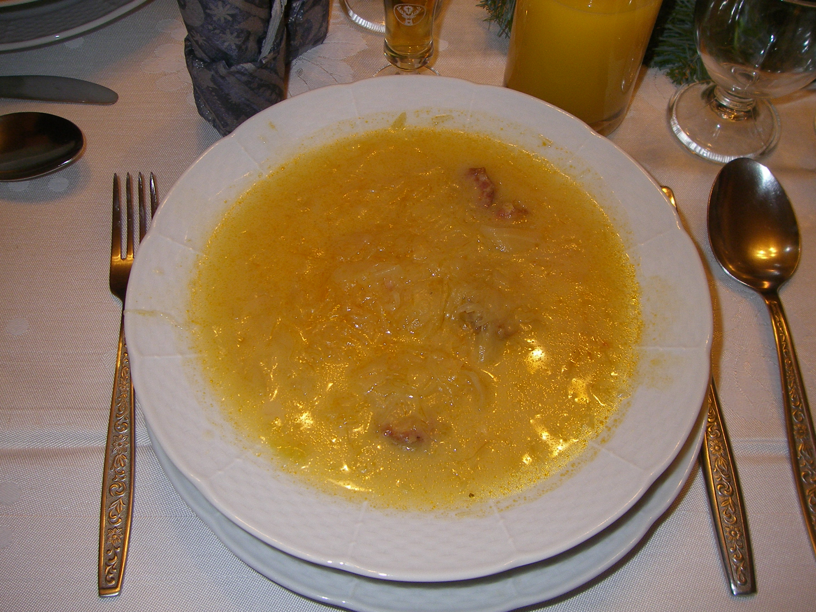 Kapustnica